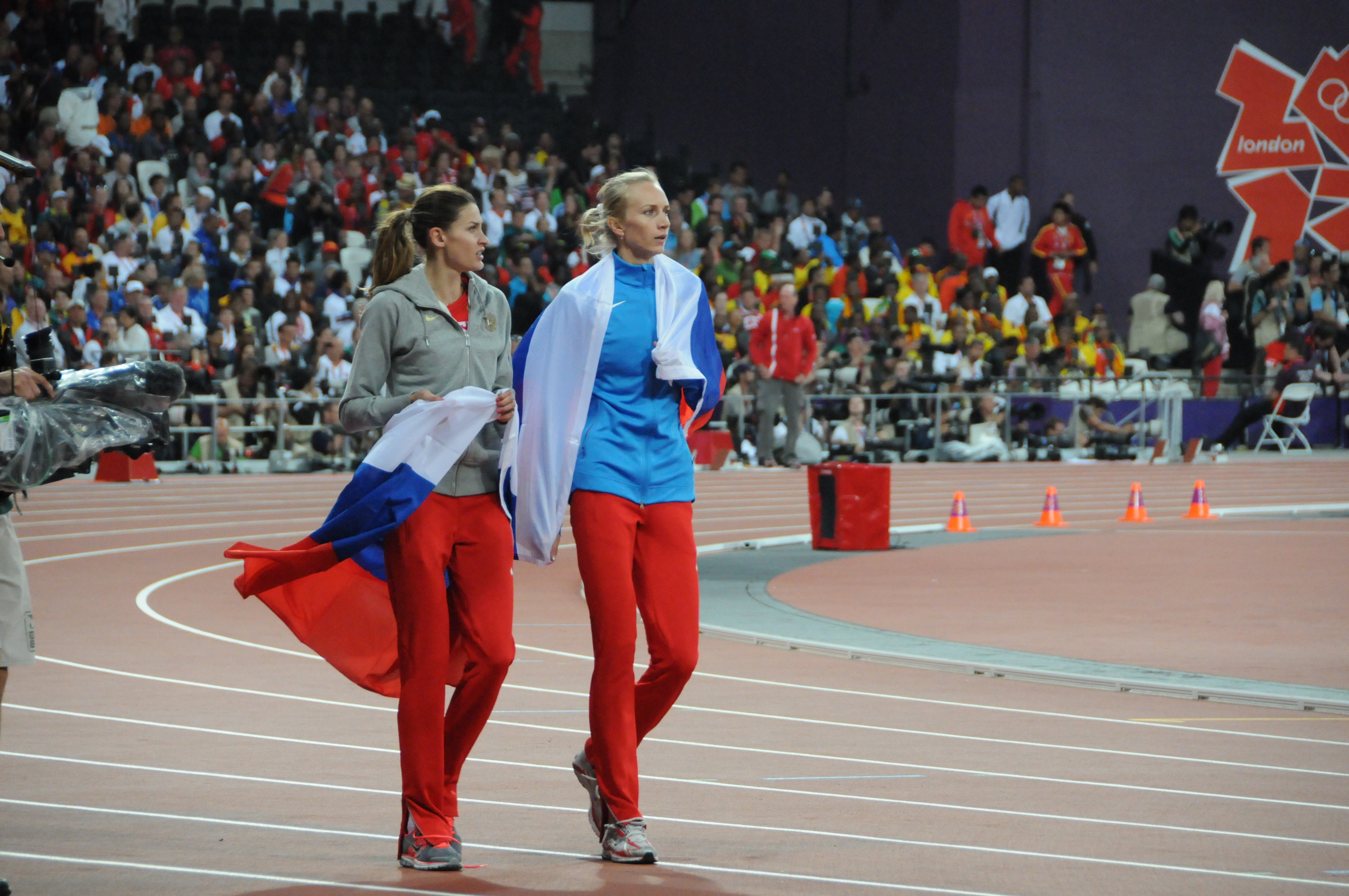 Les médaillées russes, aux JO 2012, du saut en hauteur: Anna Chicherova (or) et Svetlana Shkolina (bronze)